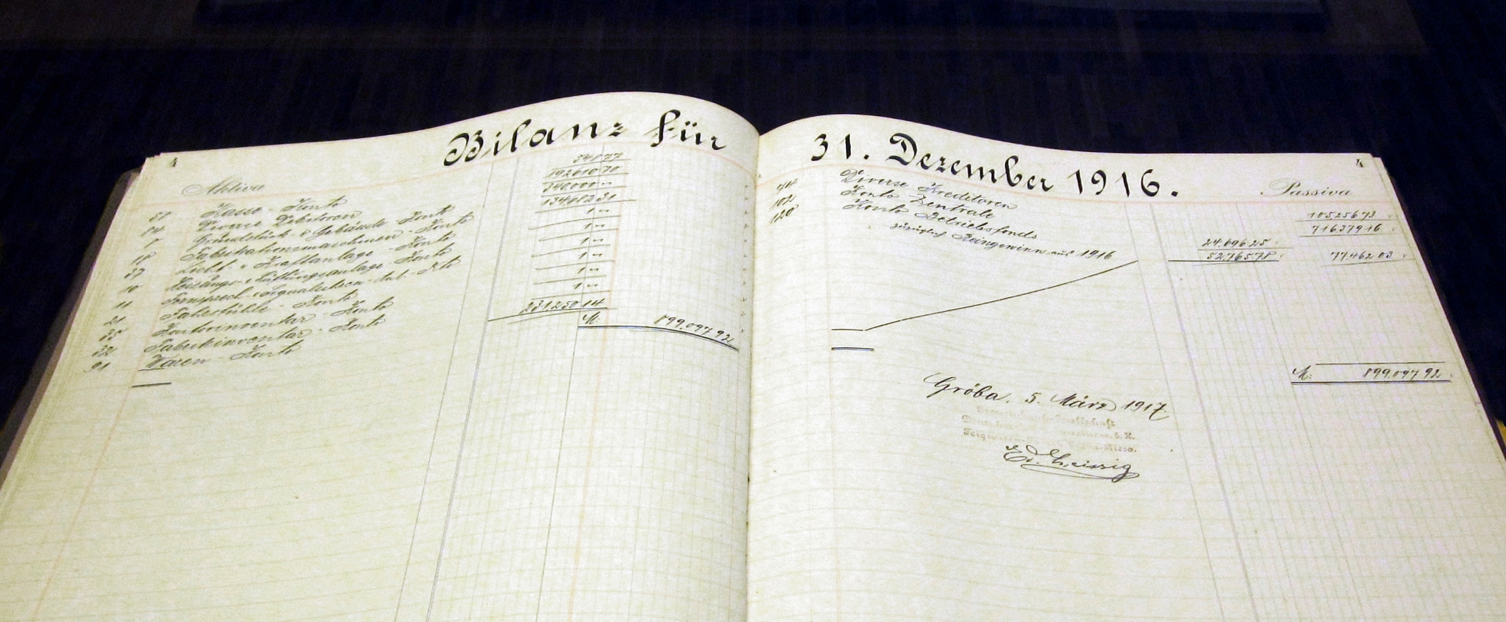 Das Bilanzbuch 1914 - 1955 ist neben den Bauakten das älteste Dokument der Teigwarenfabrik Riesa. Sämtliche Betriebseinnahmen und -ausgaben wurden darin handschriftlich festgehalten. Im Bild die Eröffnungsbilanz.